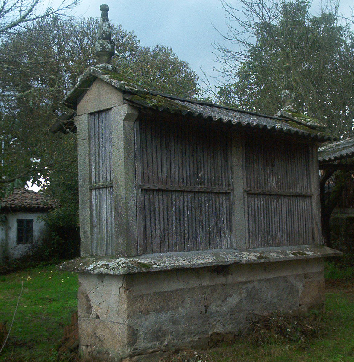 Hórreo tipo mahía, de dous claros, sobre soleira de mampostería. Penais tamén de madeira e adornado con dous lampións fusiformes. A cuberta que inicialmente foi de tella do país, foi infelizmente substituída por un material que ofrecía duración ilimitada e un mantemento mínimo... Ubícase no lugar de Alemparte, na parroquia de Dorra (Antas de Ulla)